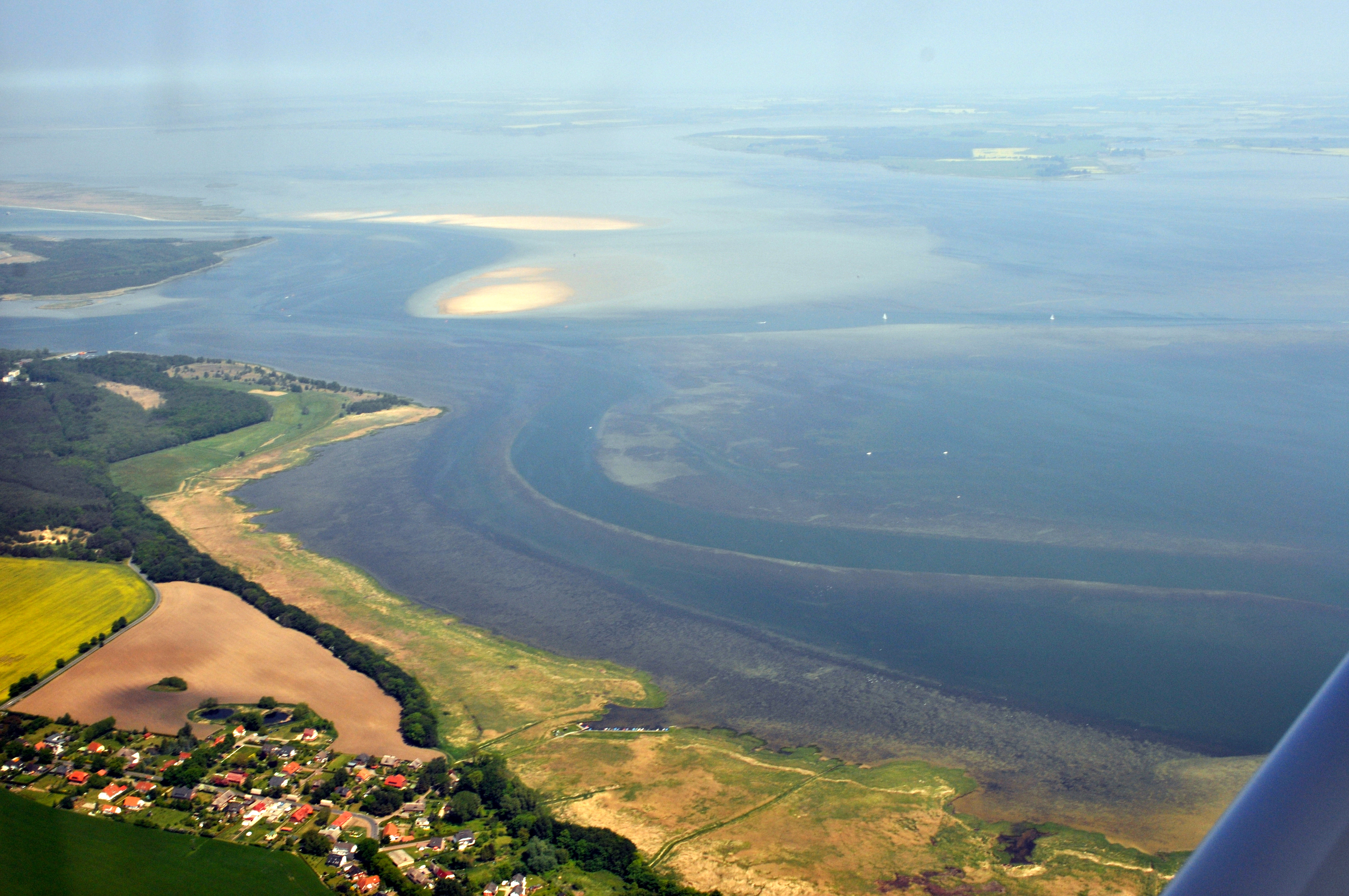 Die Bilder wurden von mir während eines einstündigen Rundflugs ab Flugplatz Güttin am 21. Mai 2011 aufgenommen. Die Bildbeschreibung steht im Dateinamen. Aufgenommen mit einer Nikon D5000 durch das Seitenfenster des Flugzeugs.